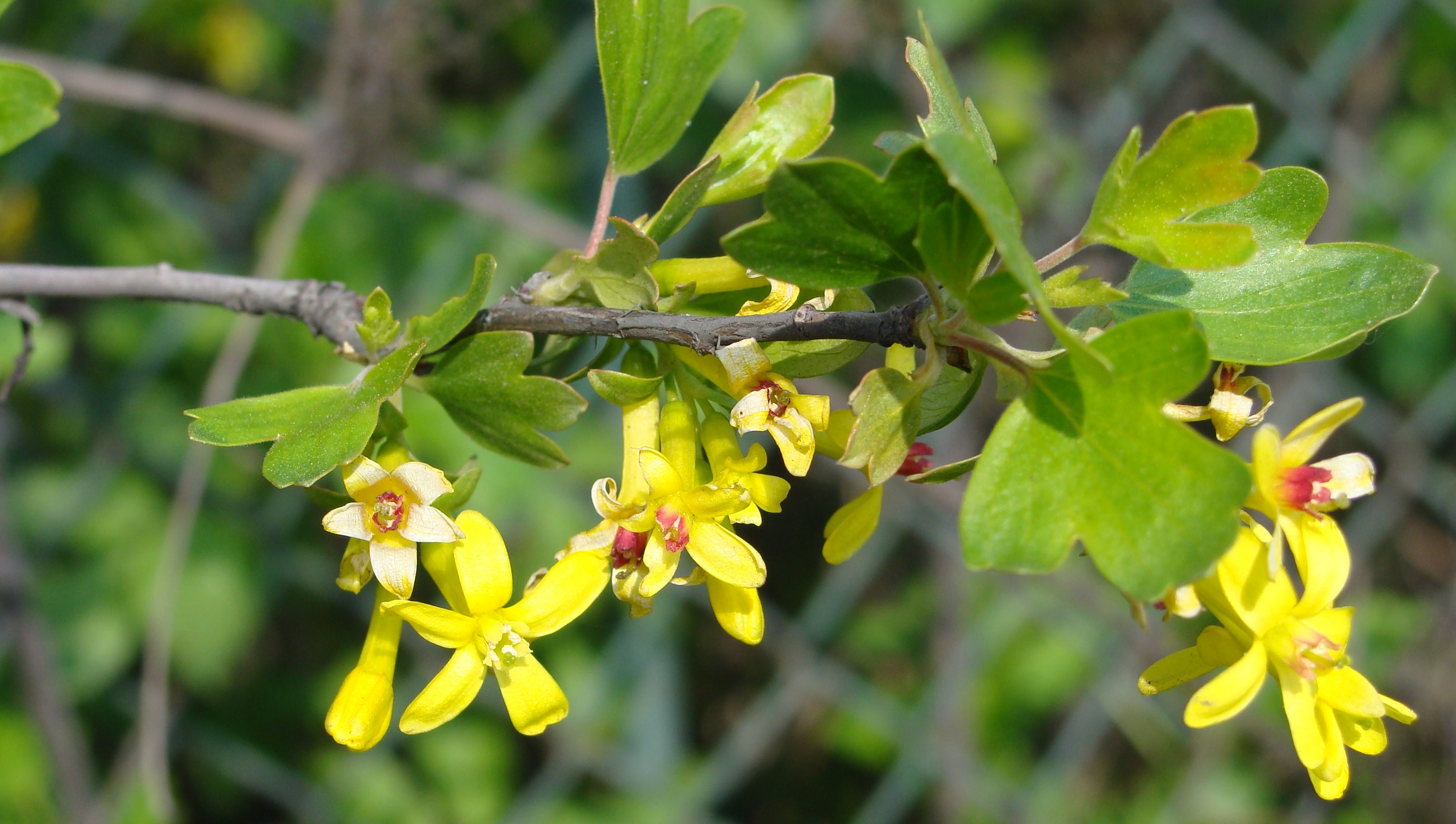 Ribes aureum Porzeczka złota